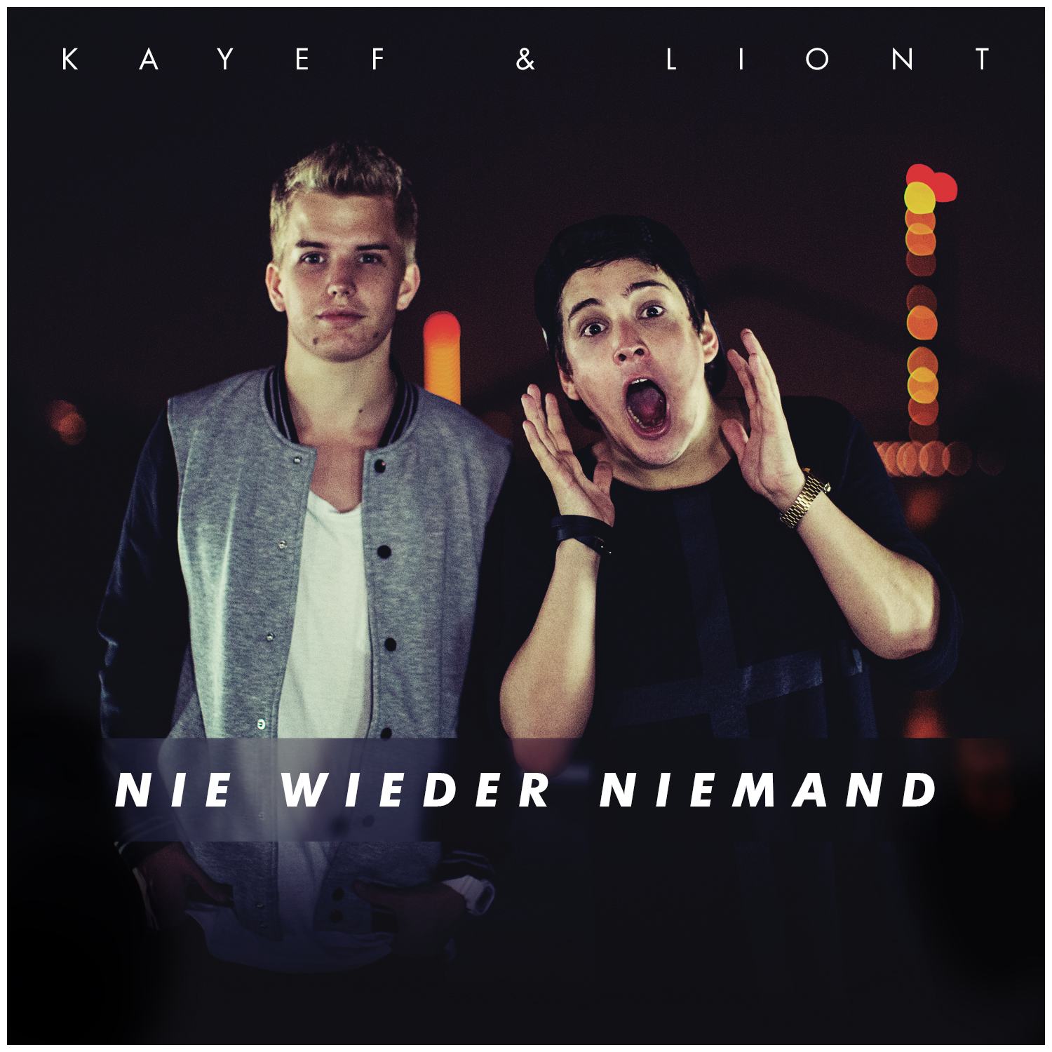 Cover der Single „Nie wieder Niemand“